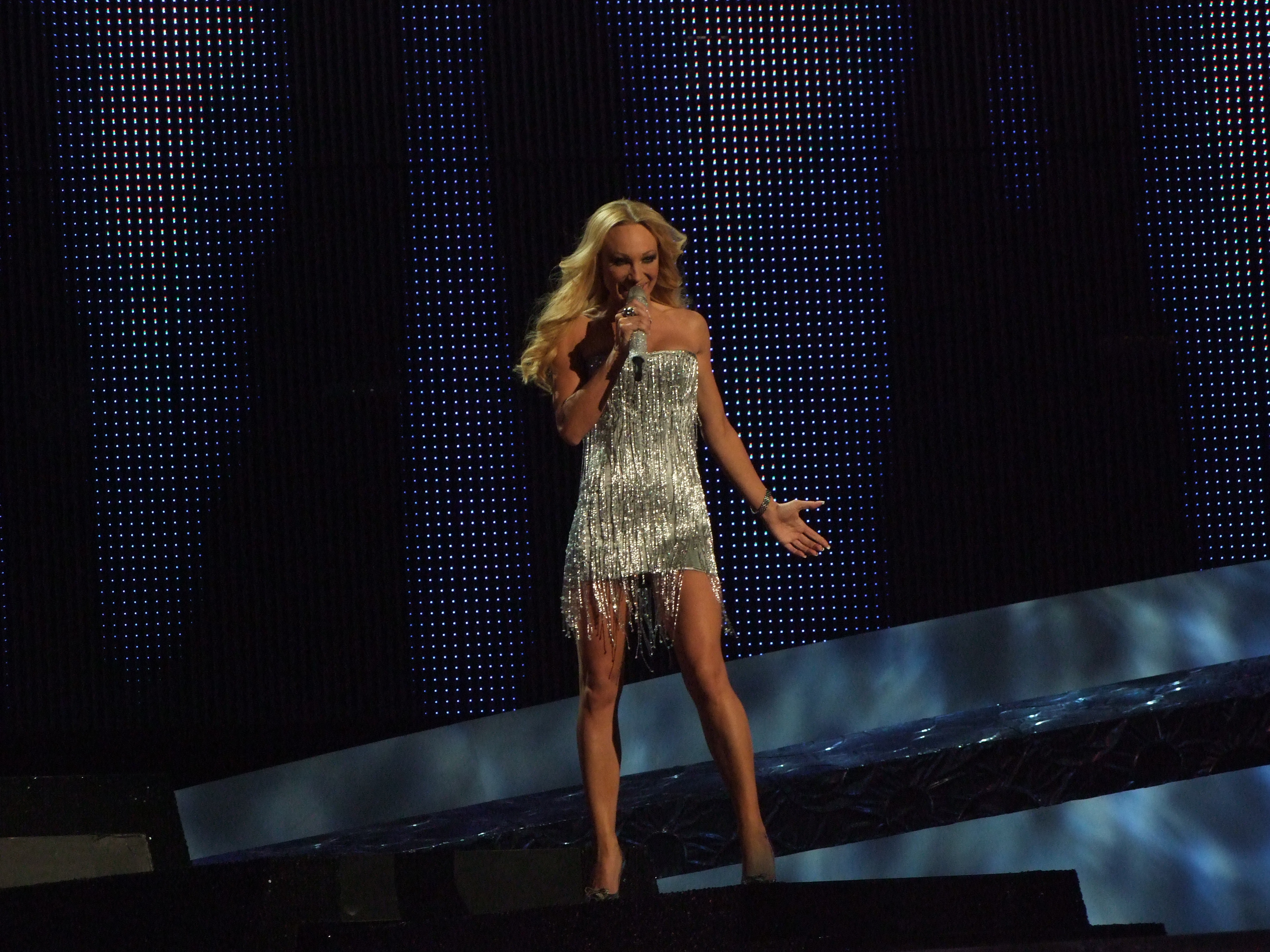 Semifinal 2 Eurovision 2008